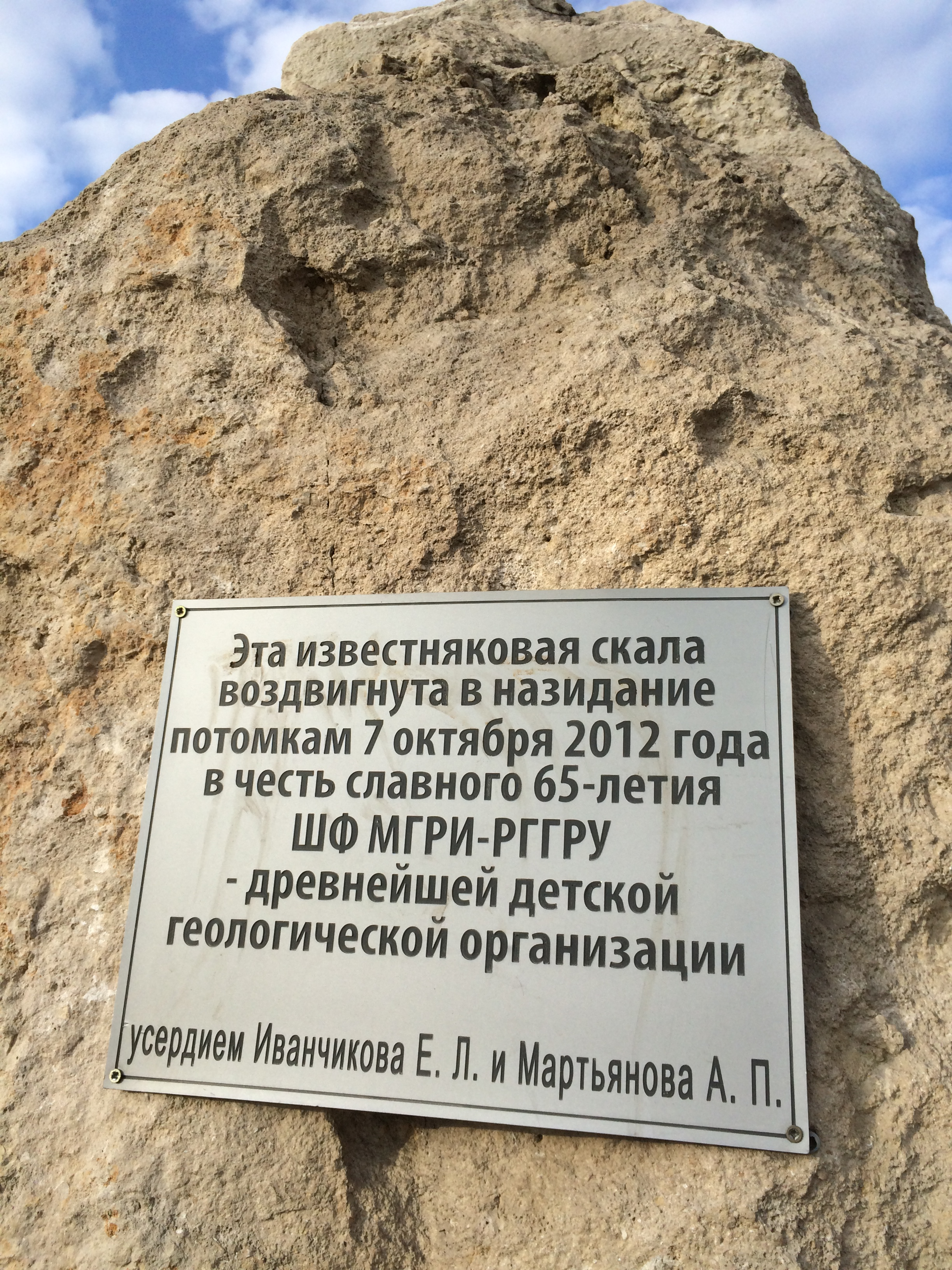 Памятник у МГРИ-РГГУ